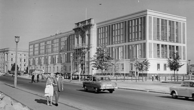 Berlin, Staatsratsgebäude Zentralbild Weiß-Krueger-Stö-4.9.1964 Berlin-wie hast du dich verändert.Das neue Gebäude des Staatsrates der DDR an der Südseite des Marx-Engels-Platzes in Berlin kurz vor seiner Fertigstellung (Anfang September 1964)